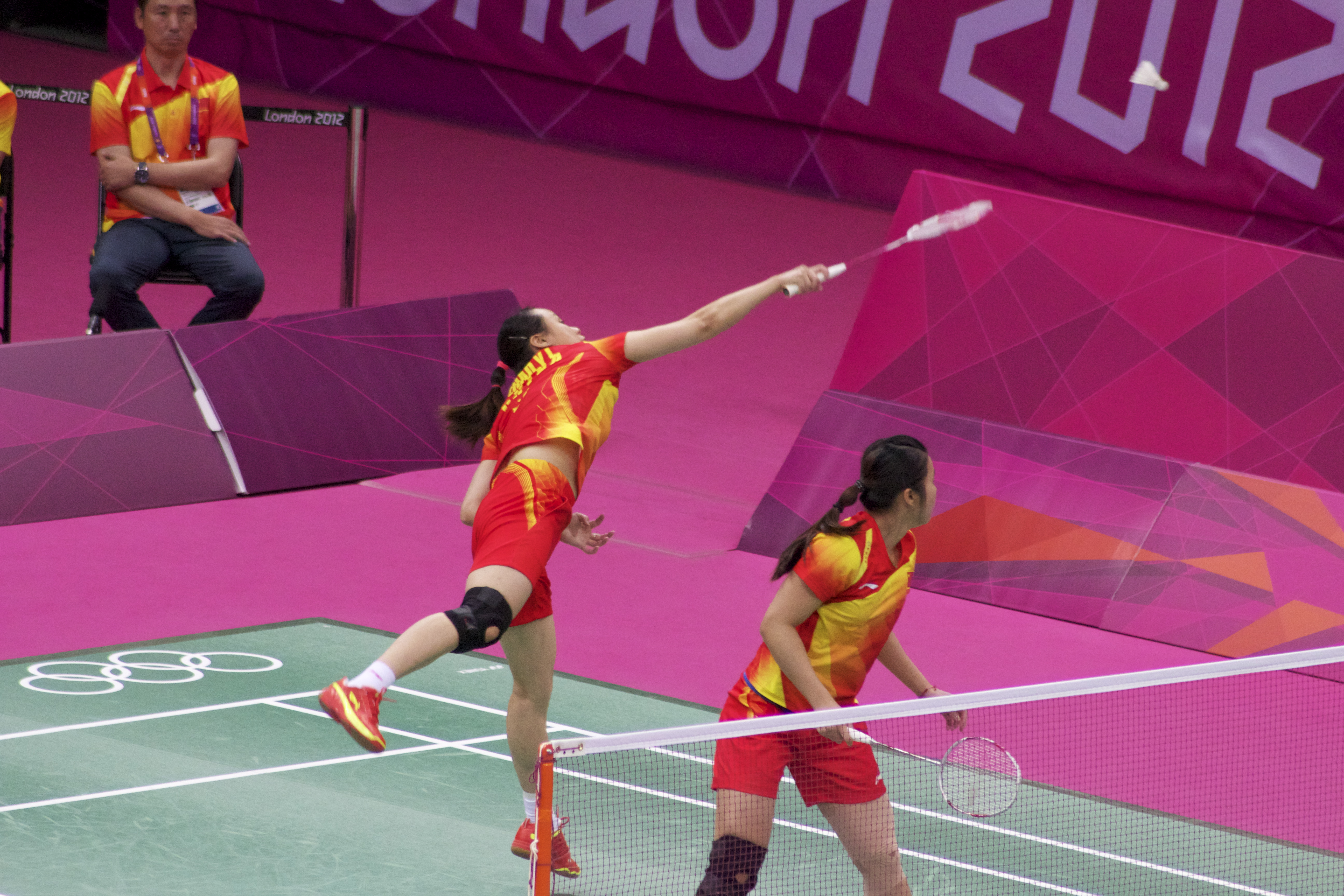 Gold Medalists